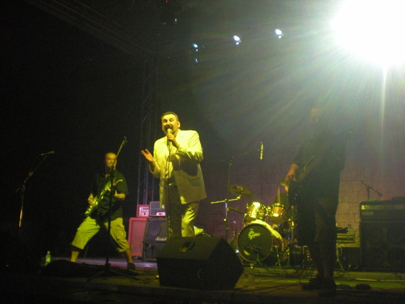 Pero Deformero uživo na Nisomnia festivalu, Niš, septembar 2009.